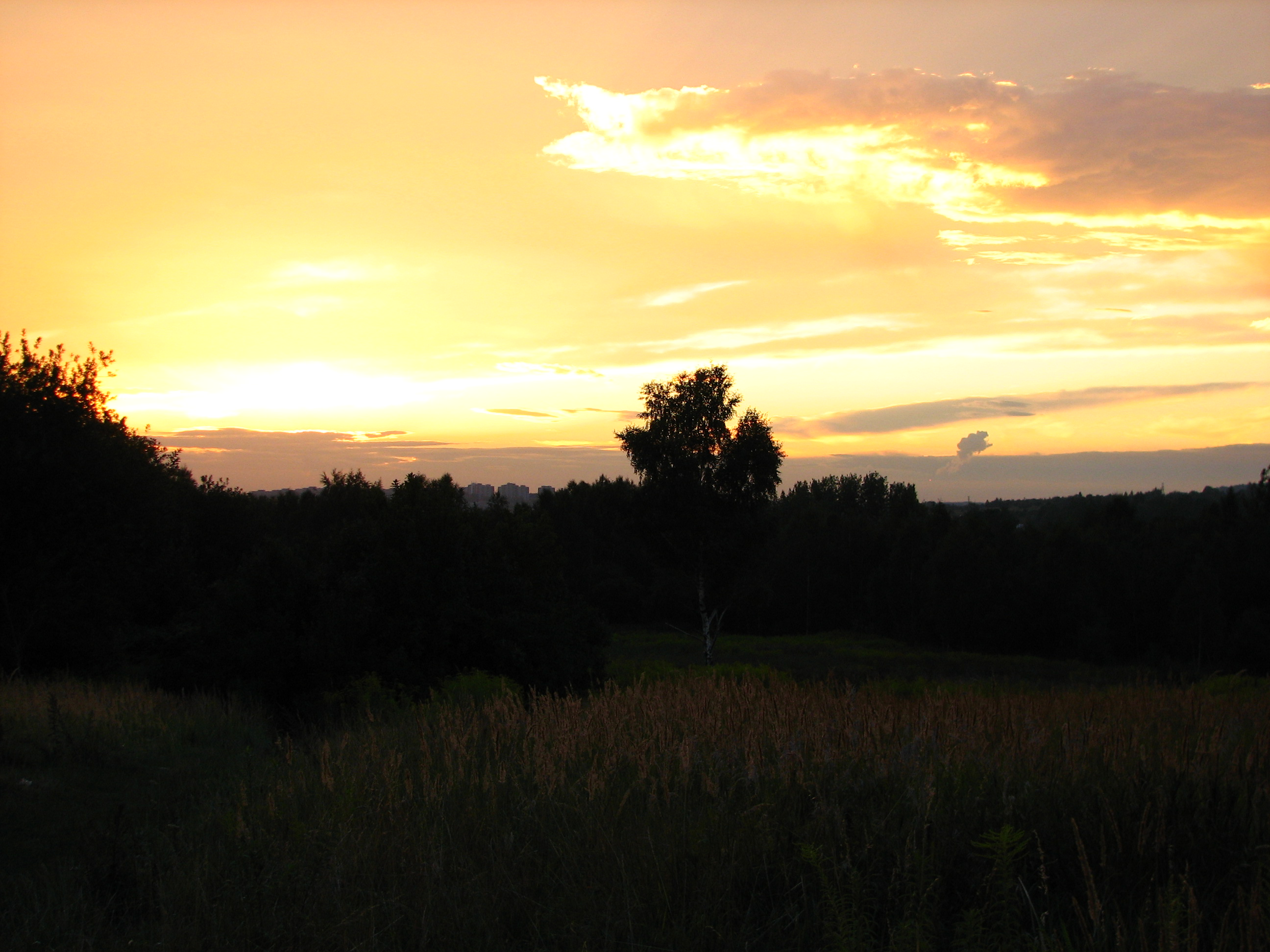 Zagórzańskie Łąki